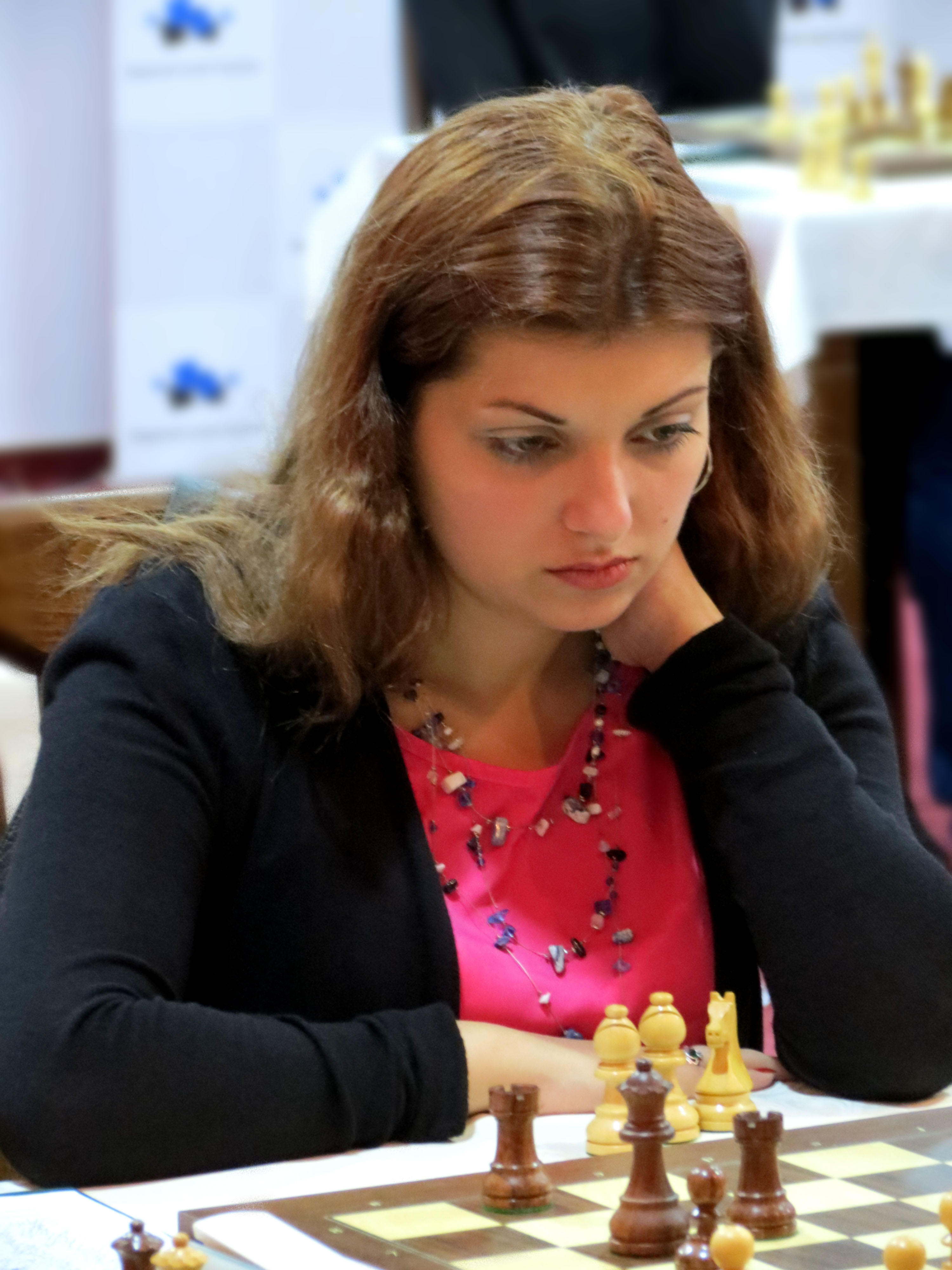 Долуханова Євгенія Григорівна